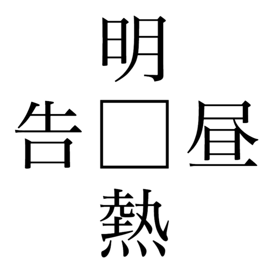 パズルの一種である和同開珎の例題